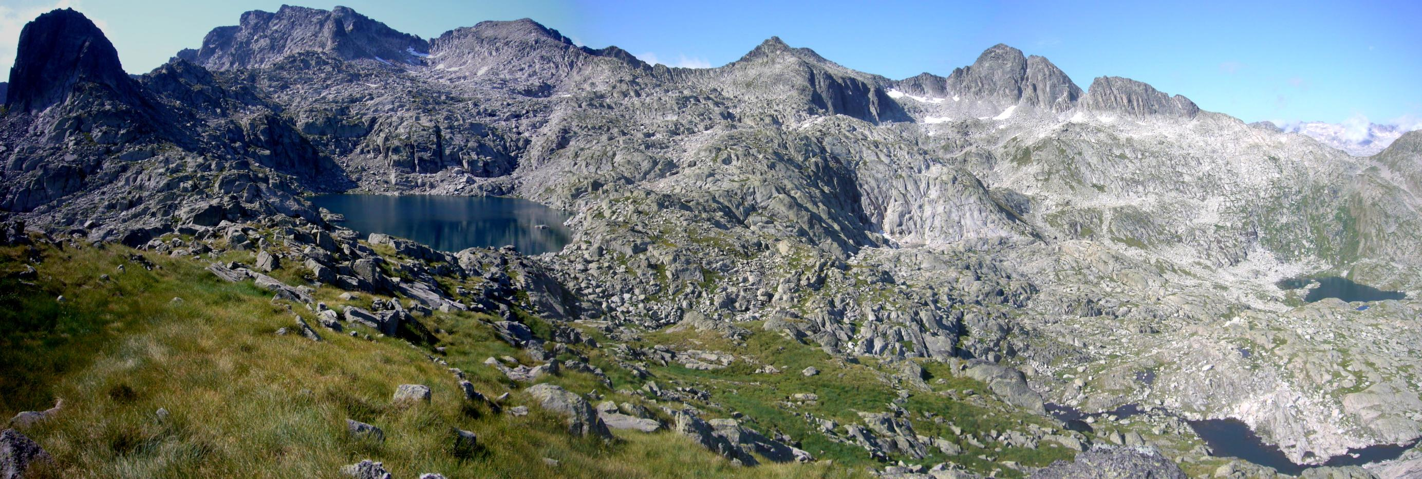 Cims sud-occidentals del Circ de Colomèrs, vistos des del Tossal del Óssos; Naut Aran, Vall d’Aran, Catalunya